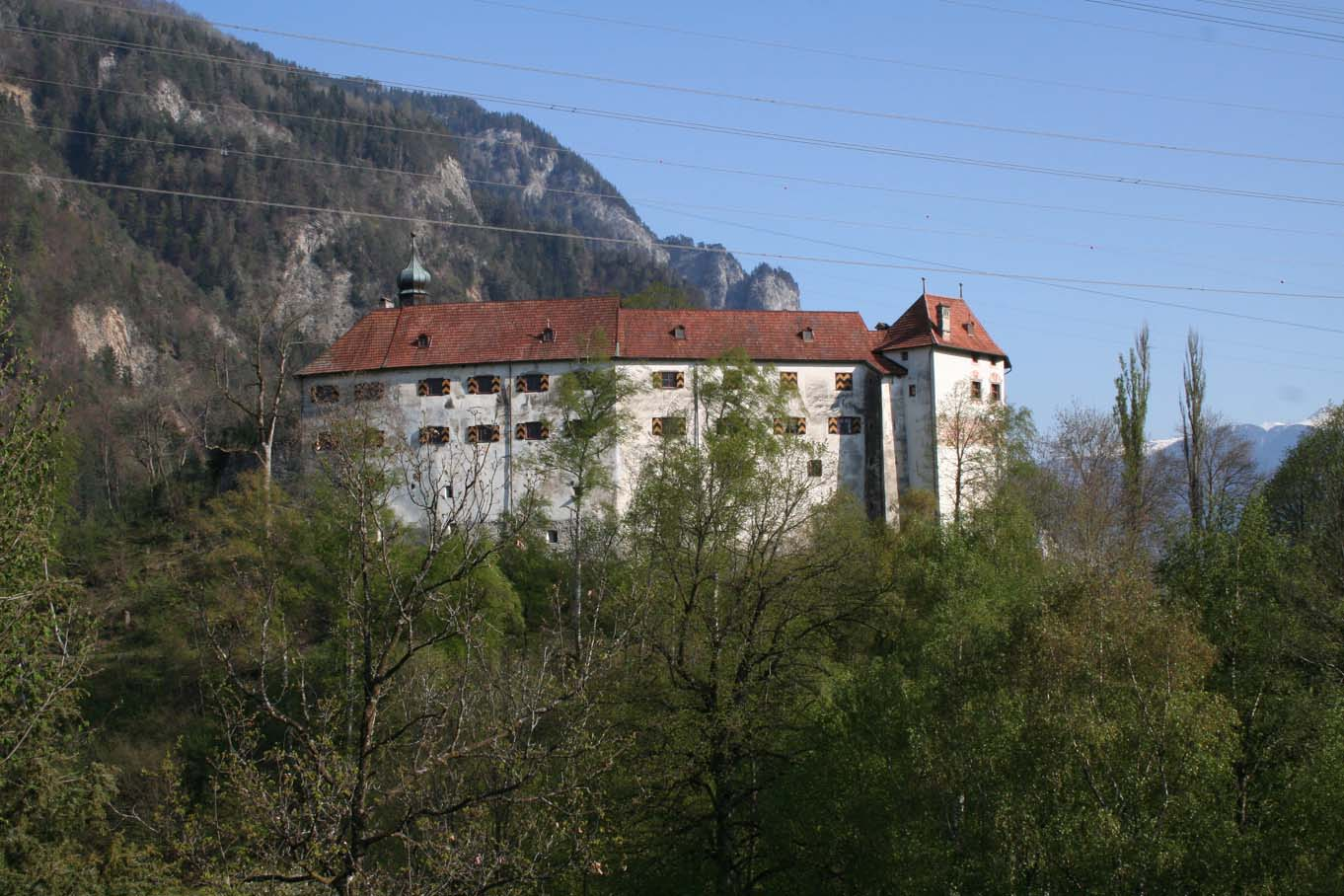 Schloss Rhäzüns, Nordseite